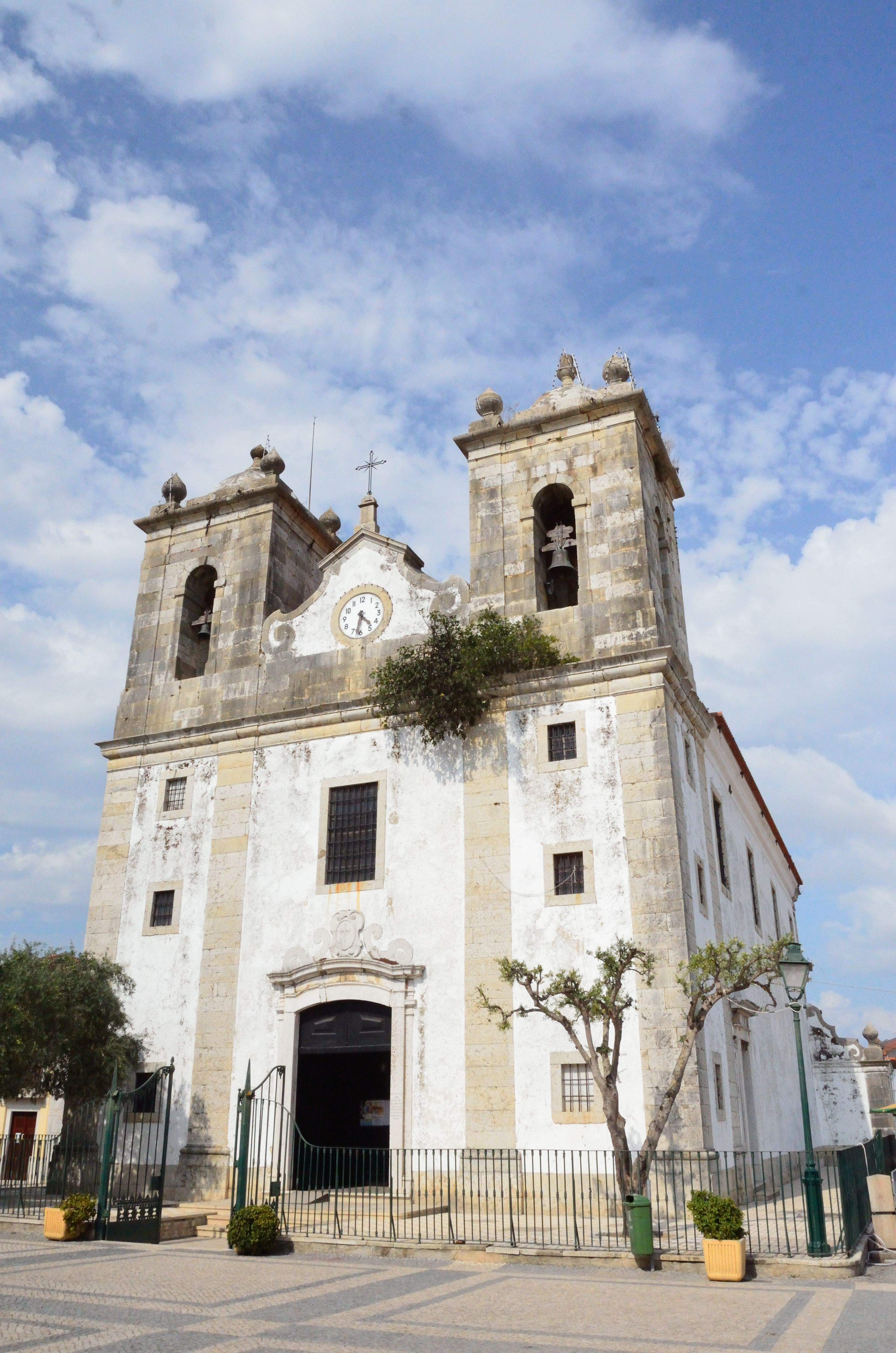 Vista da fachada principal